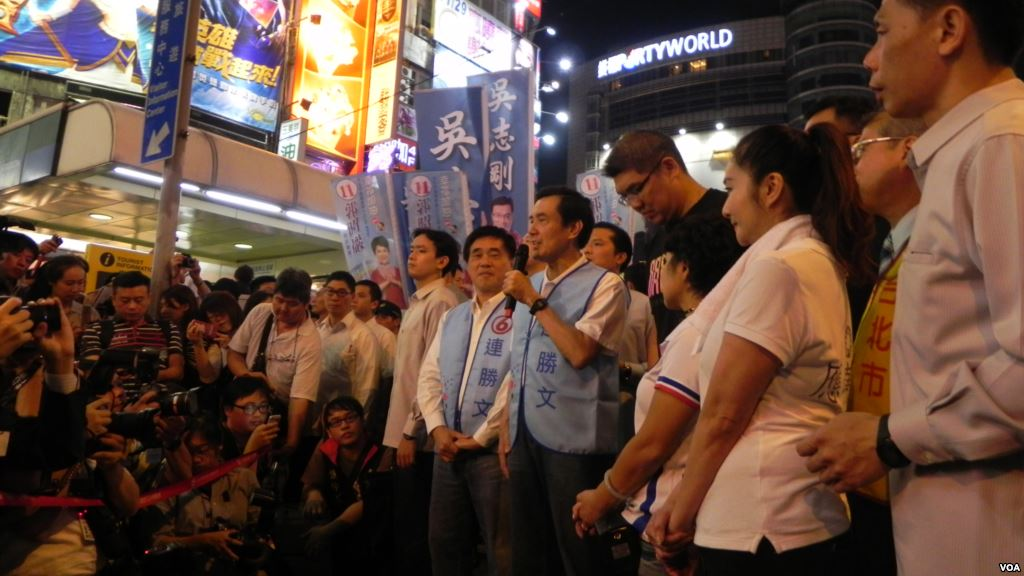 中國國民黨主席馬英九（手持麥克風者）親自上街，在臺北捷運西門站6號出口為臺北市市長候選人連勝文（馬英九身後穿黑衣者）拉票。